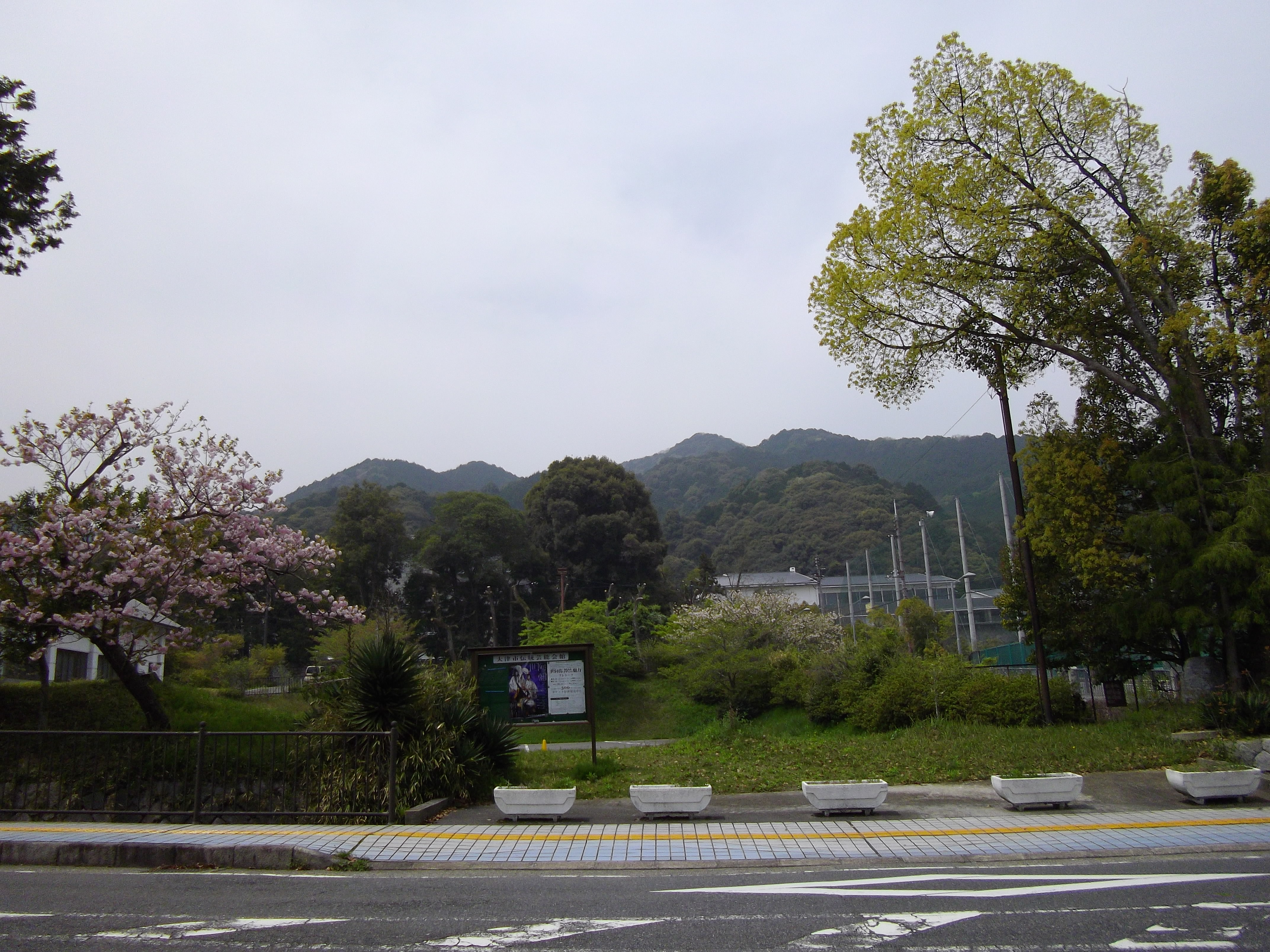 如意ヶ嶽。大津市伝統芸能快感近辺から、西方面。2012年春。